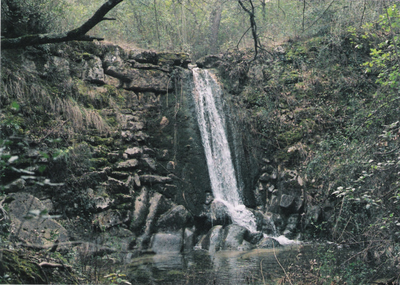 païchère à Montrafet